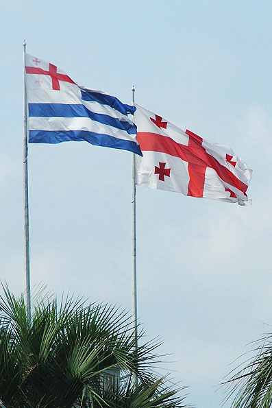 Ajaria